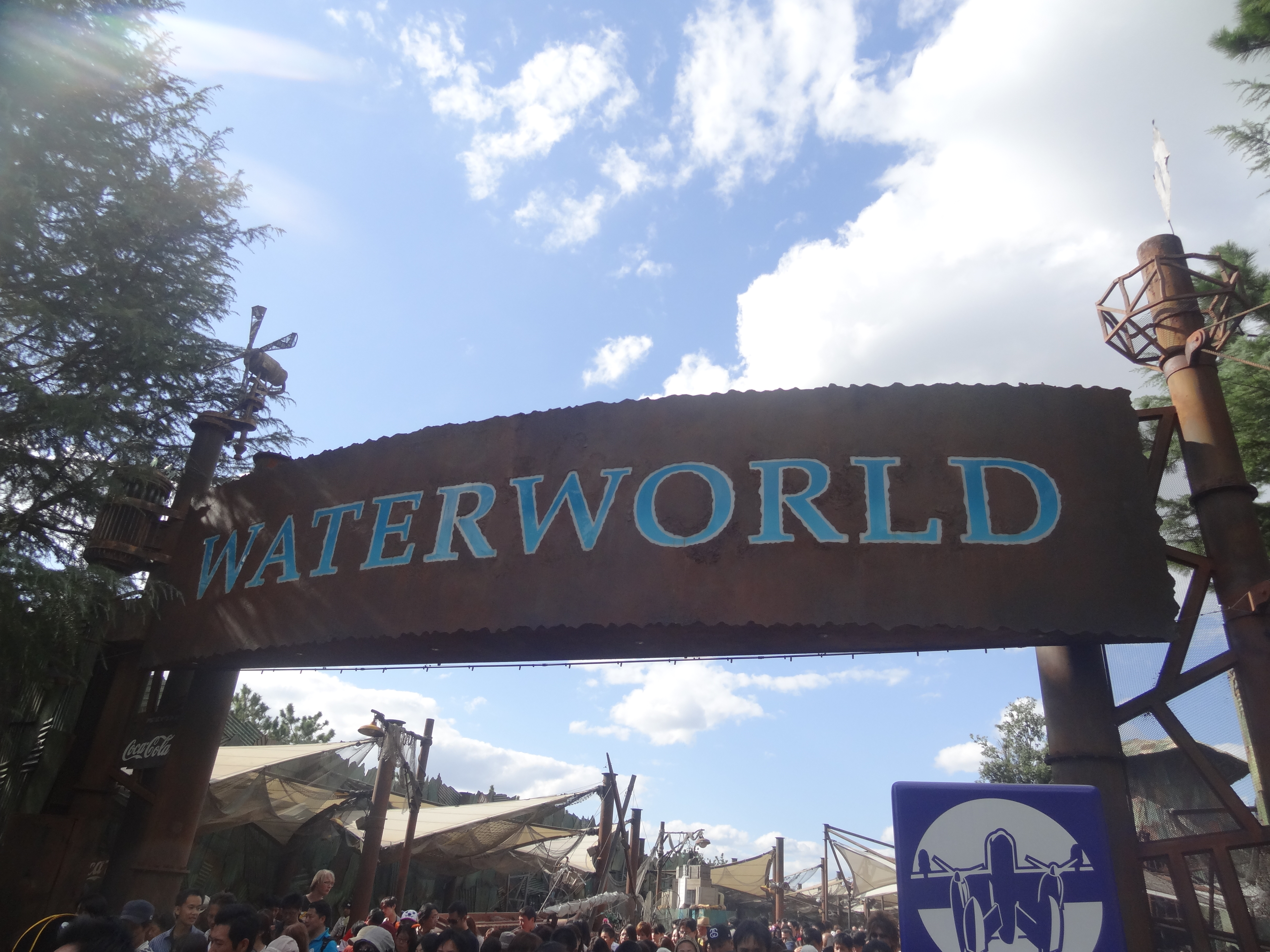 Enseigne du show Waterworld à Universal Studios Japan